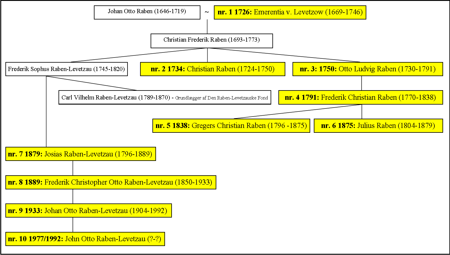 Familien Raben-Levetzau som ejere af Ålholm (grevskabet Christiansholm) Family Raben-Levetzau as owners of Ålholm (Denmark)